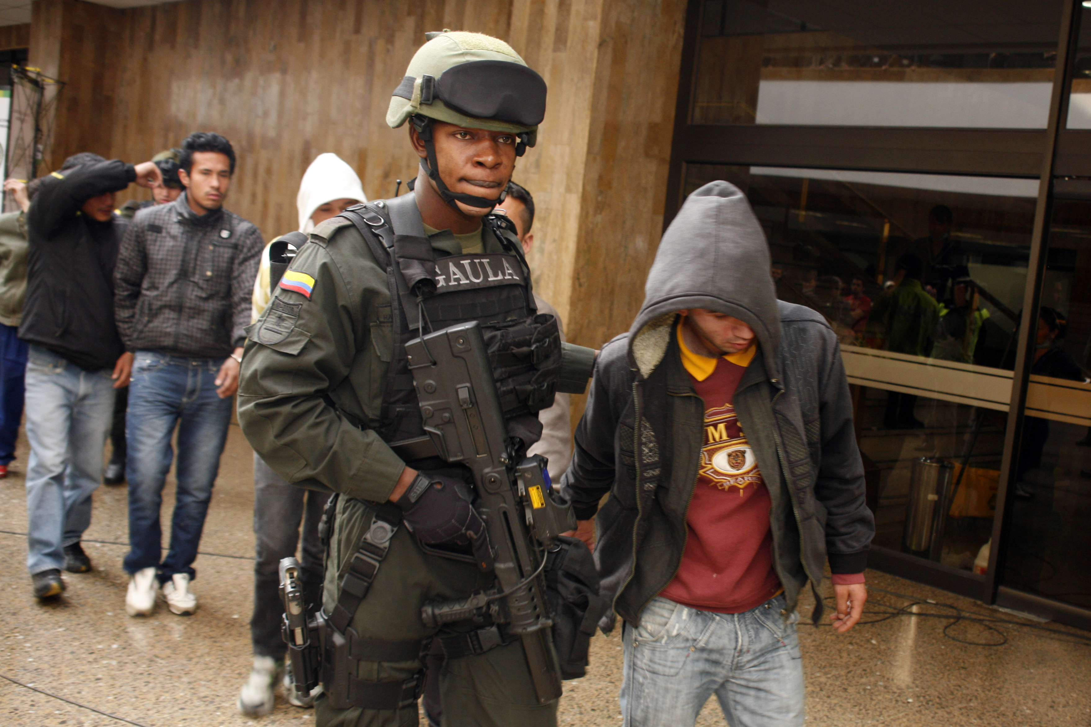 Bogotá. En cumplimiento a las instrucciones impartidas por el Gobierno nacional para avanzar en la consecución de resultados contra las bandas criminales y delincuenciales dedicadas a la extorsión y microextorsión, a fin de debilitar sus estructuras y contener las acciones delictivas, la Policía Nacional a través del Gaula, asestó un duro golpe a la banda delincuencial denominada “los sureños”, al lograr su desarticulación al capturar a sus 11 integrantes.